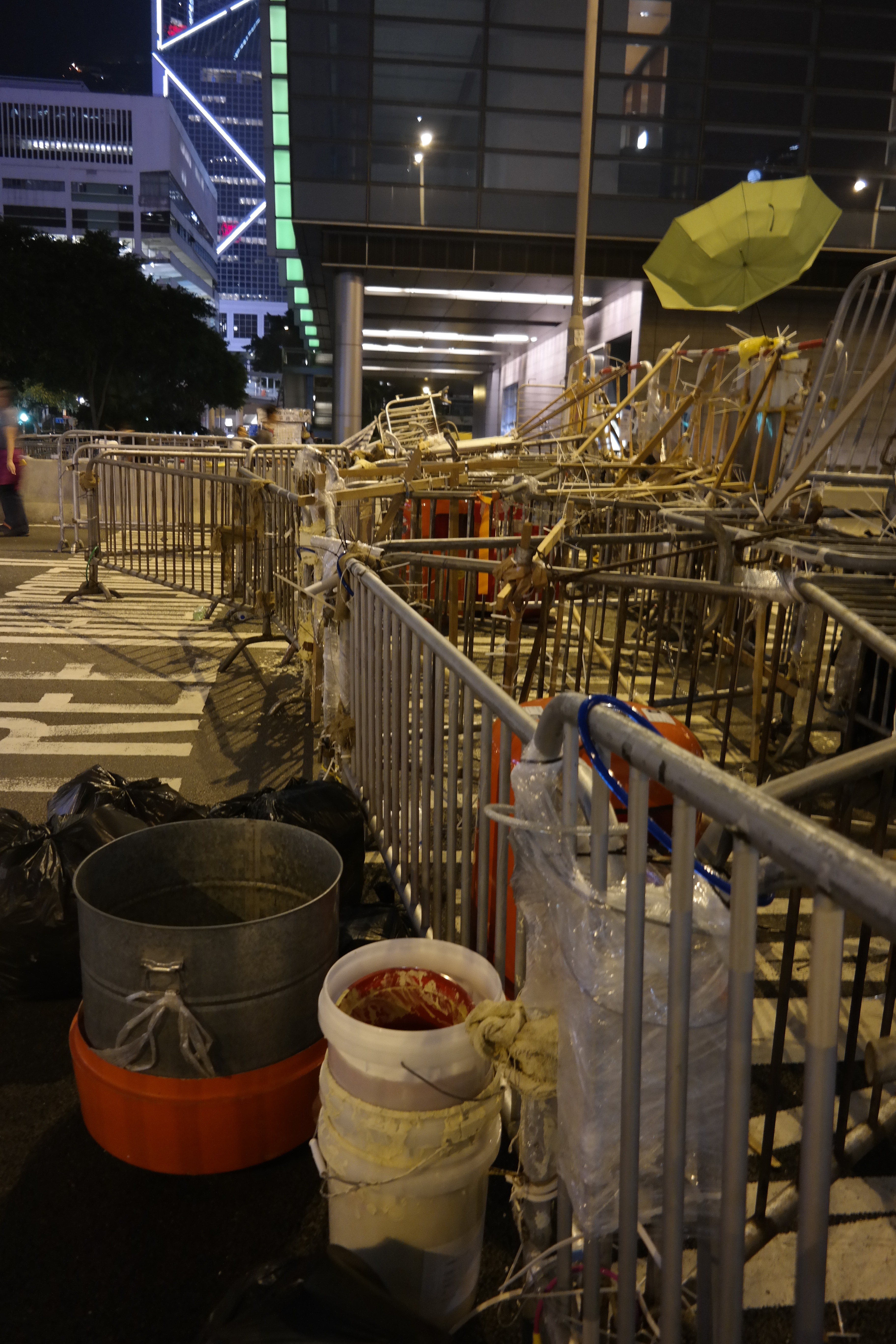 中文（香港）: 金鐘路障，帶有單車鎖